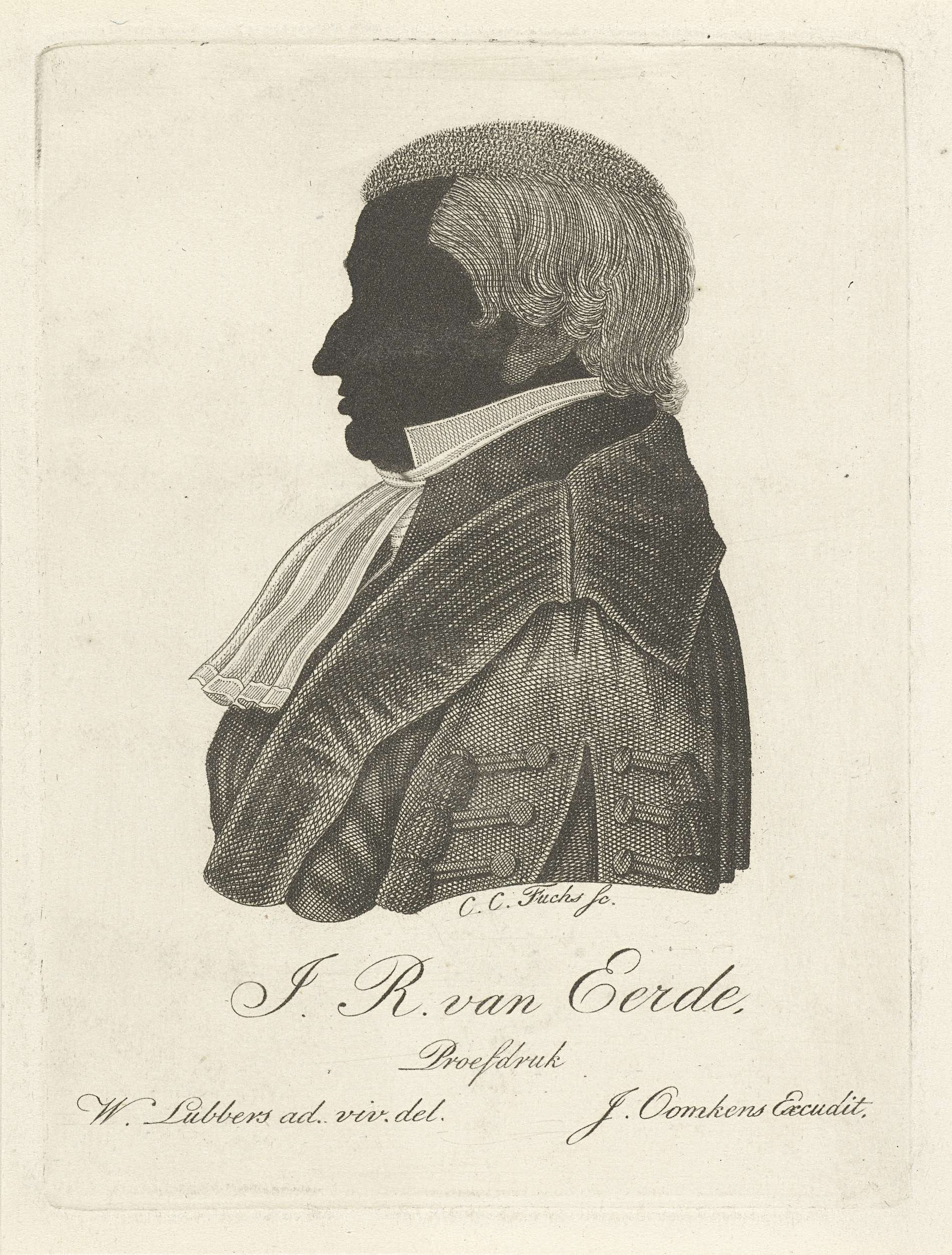 Silhouetportret van Jan Rudolf van Eerde (1774-1835). Portret bestemd voor: Swinderen, Theodorus van (red.). Almanak der Akademie van Groningen. Groningen: J. Oomkens (II), 1829.